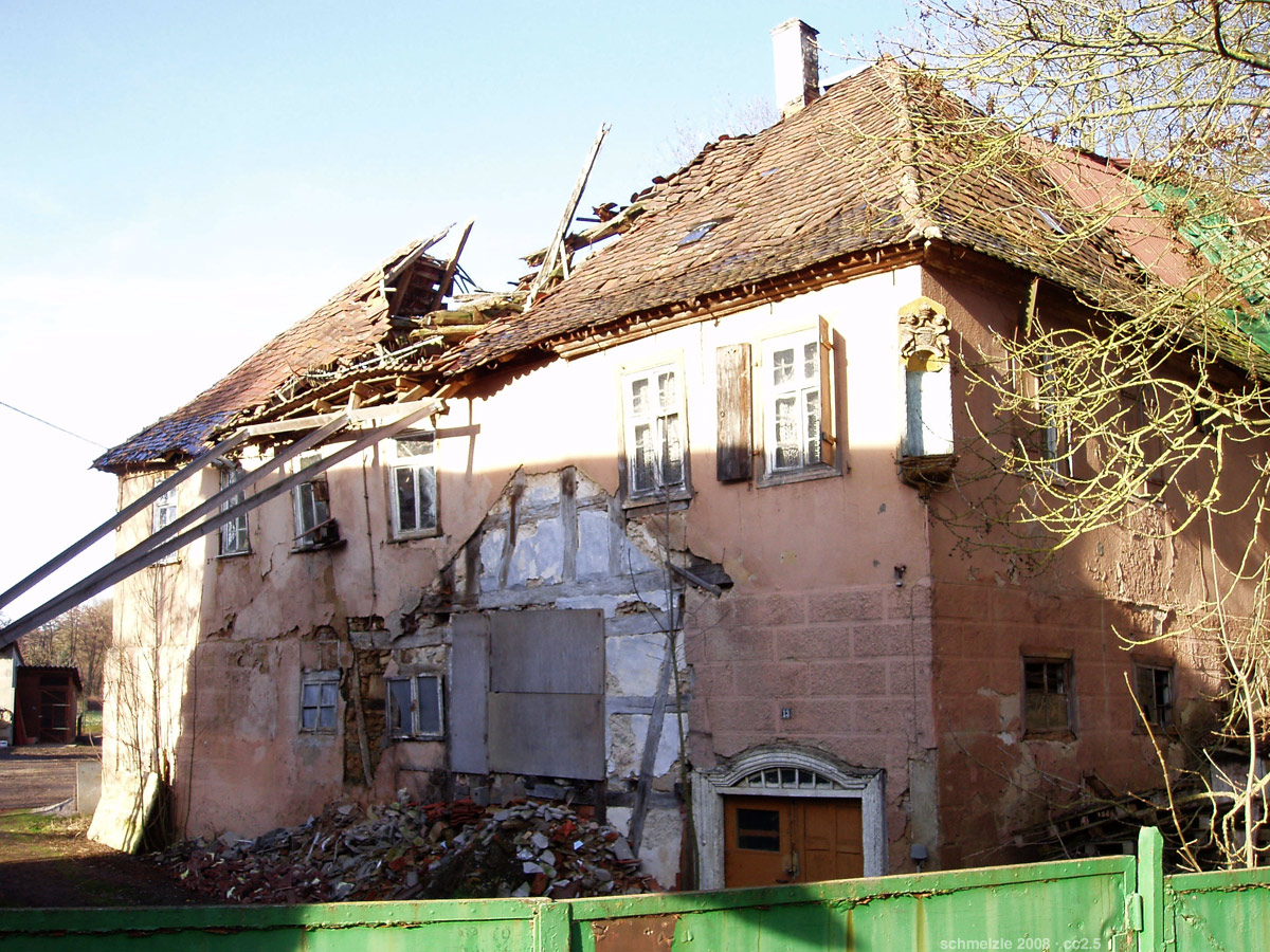 Mühle in der Mühlgasse 13 Heilbronn-Biberach